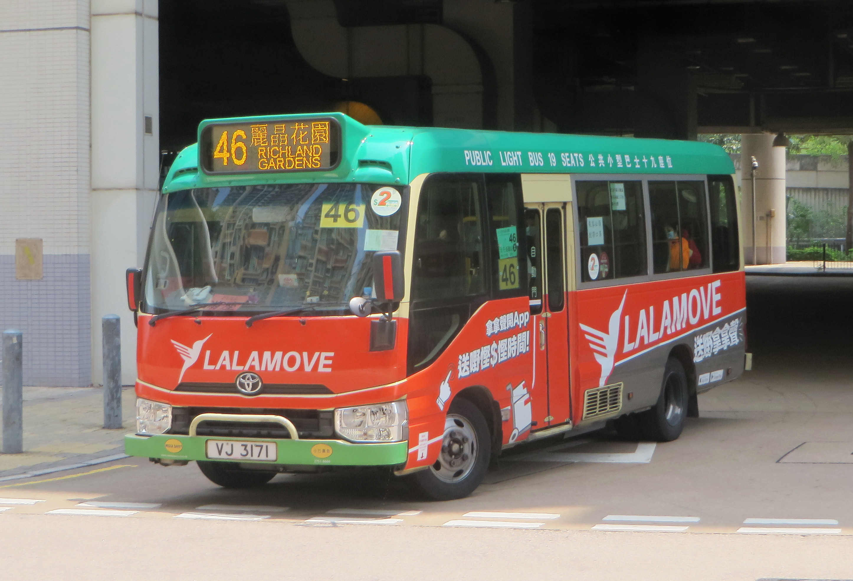 中文（中国大陆）: 小巴VJ3171的照片